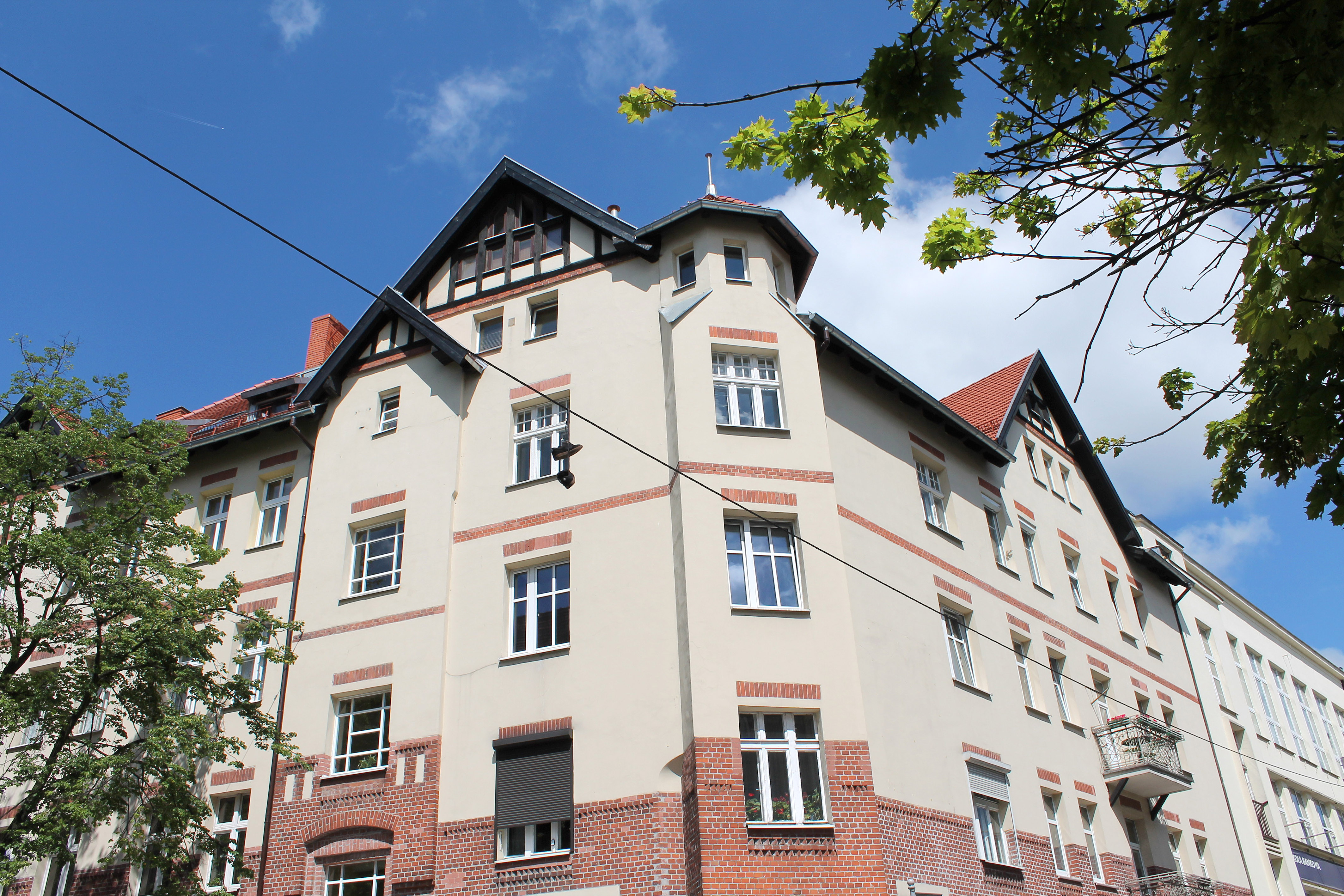 Św. Czesława 9